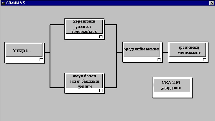 Монгол: Ерөнхий байдалын дэлгэц